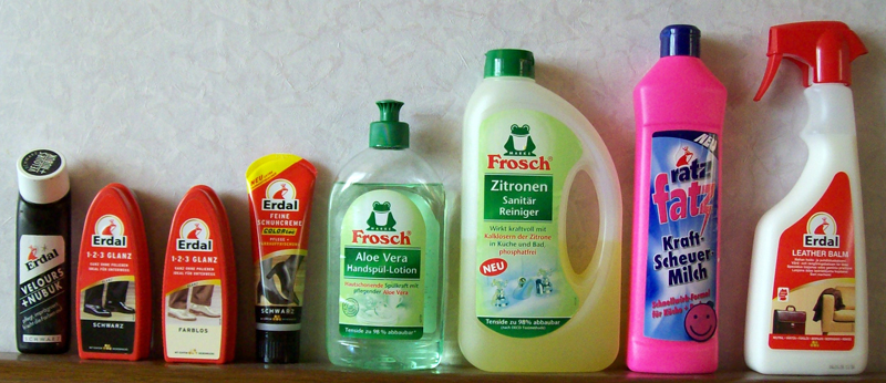 Auswahl aus der Produktpalette von Werner & Mertz.